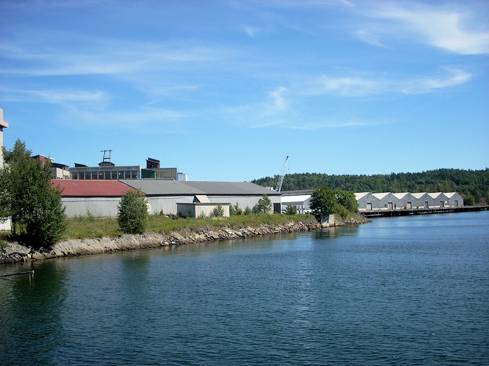 Saint-Gobain Eydehavn, Arendal, Norge